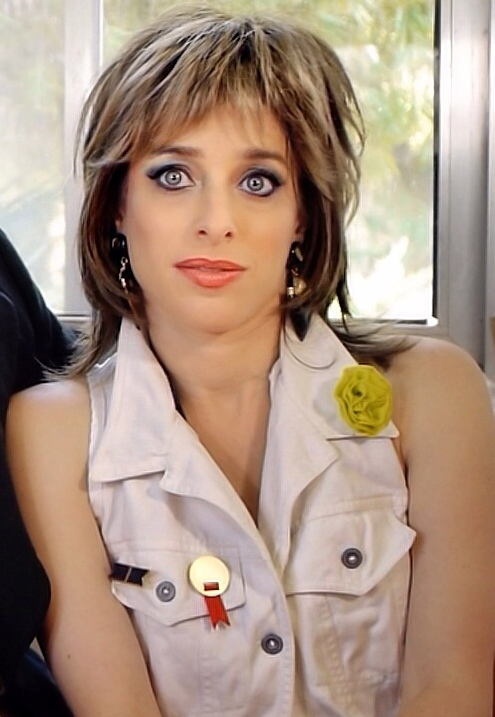 ליאת הר-לב ב"משיח" פרק 7